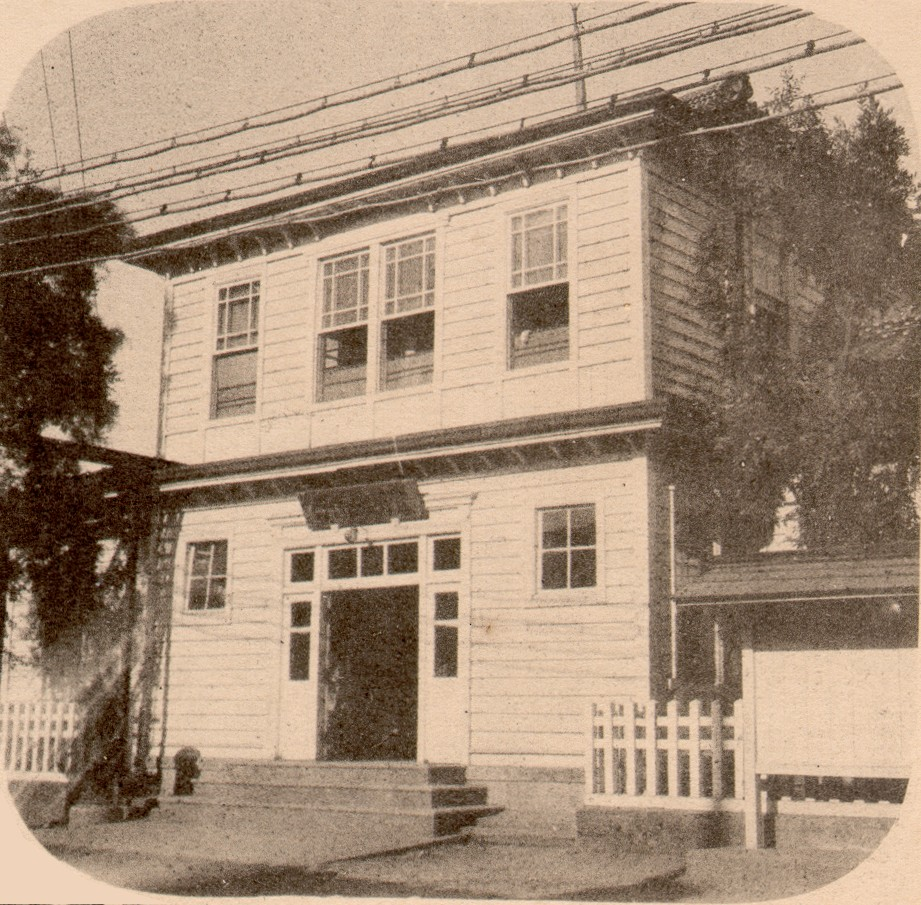 中文（台灣）: 宜蘭郵便局，現址為宜蘭中正路郵局